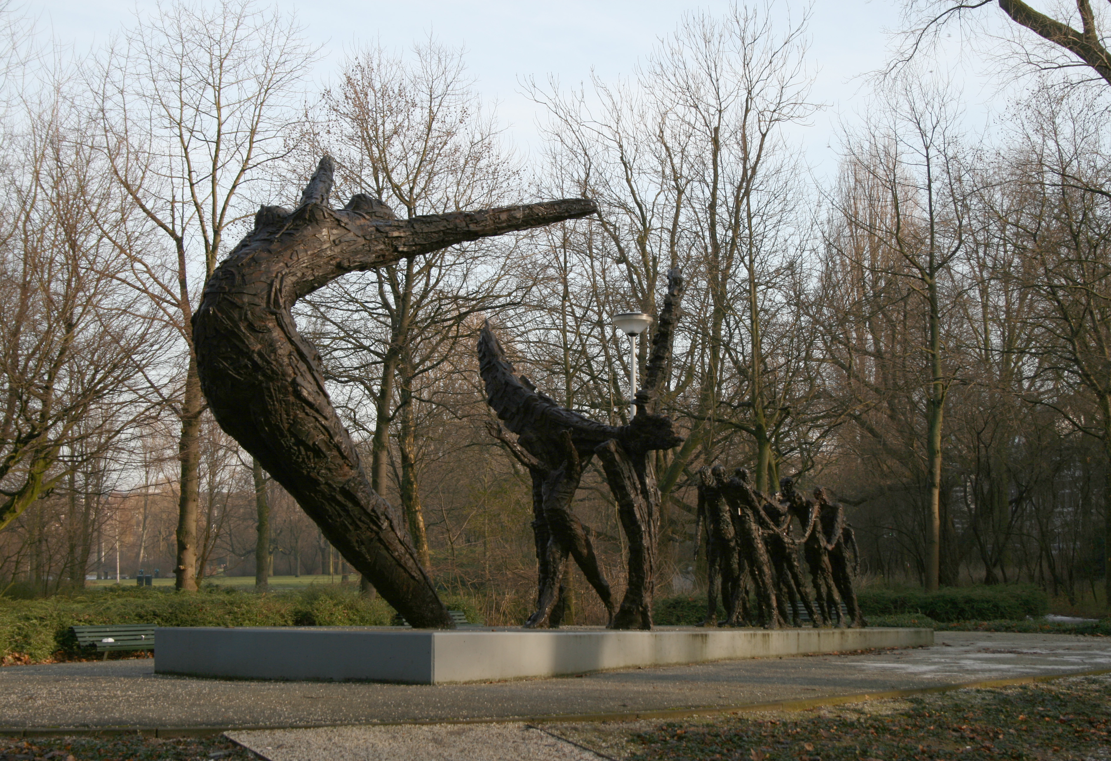 Nationaal Monument Slavernijverleden, Oosterpark, Amsterdam, Holland. Made by Erwin de Vries in 2002.